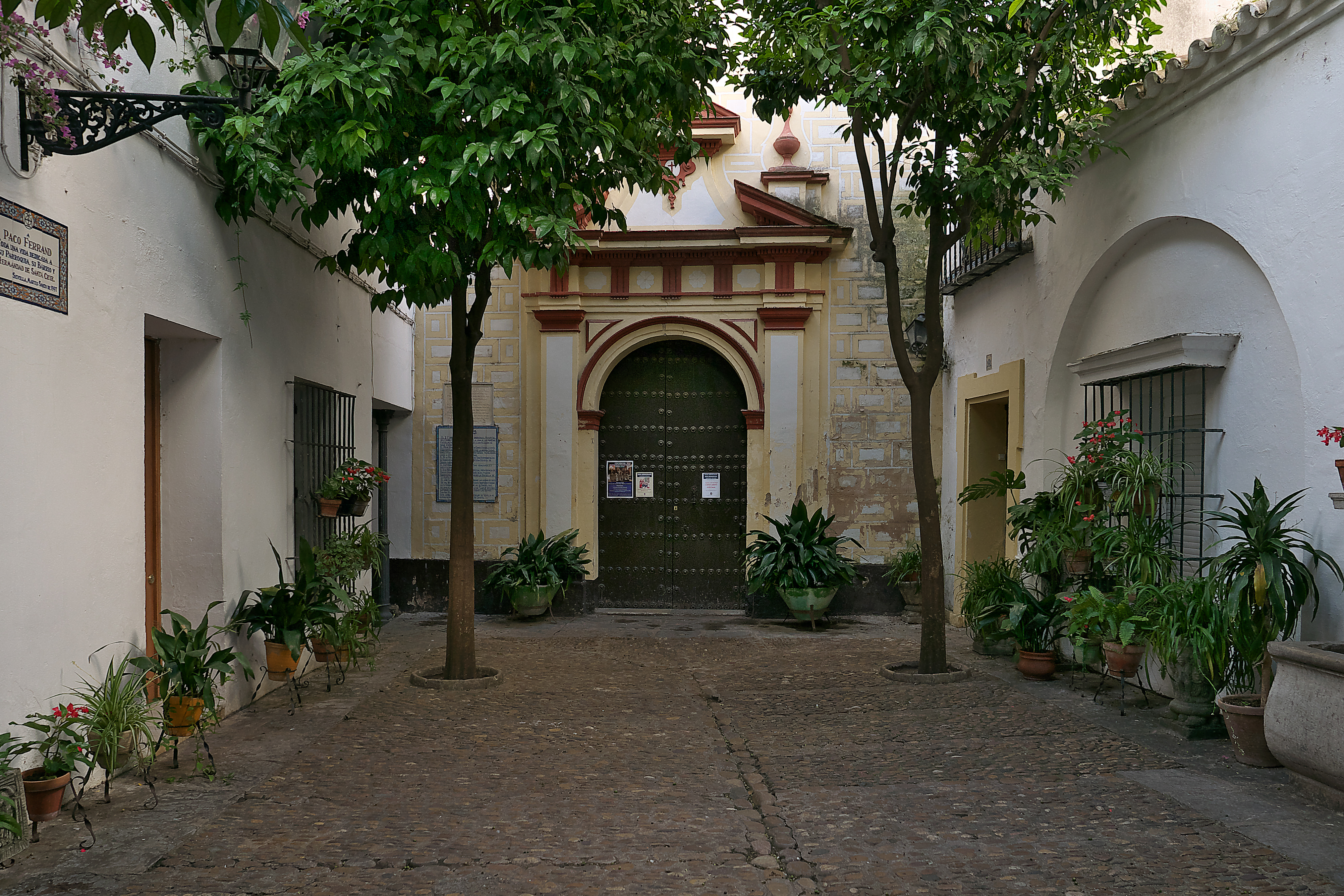 Institución fundada en el desaparecido Hospital del Espíritu Santo de Sevilla (2/2/1662) y establecida en este oratorio propio desde 1795.